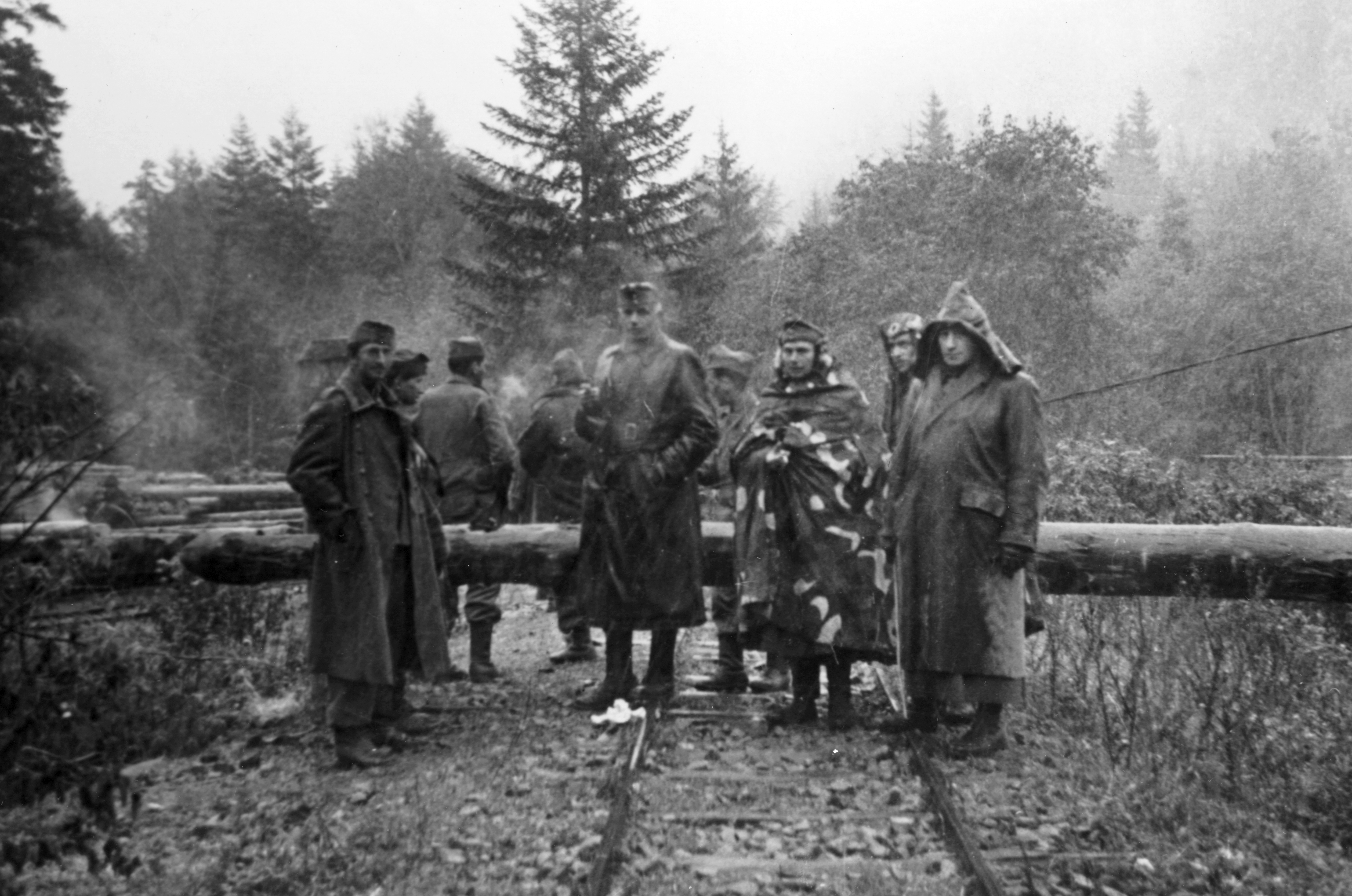 munkaszolgálatos szakasz a Magyar - Román határsorompónál. Location: Romania, Transylvania, Valea Uzului Tags: holocaust Title: munkaszolgálatos szakasz a Magyar - Román határsorompónál.